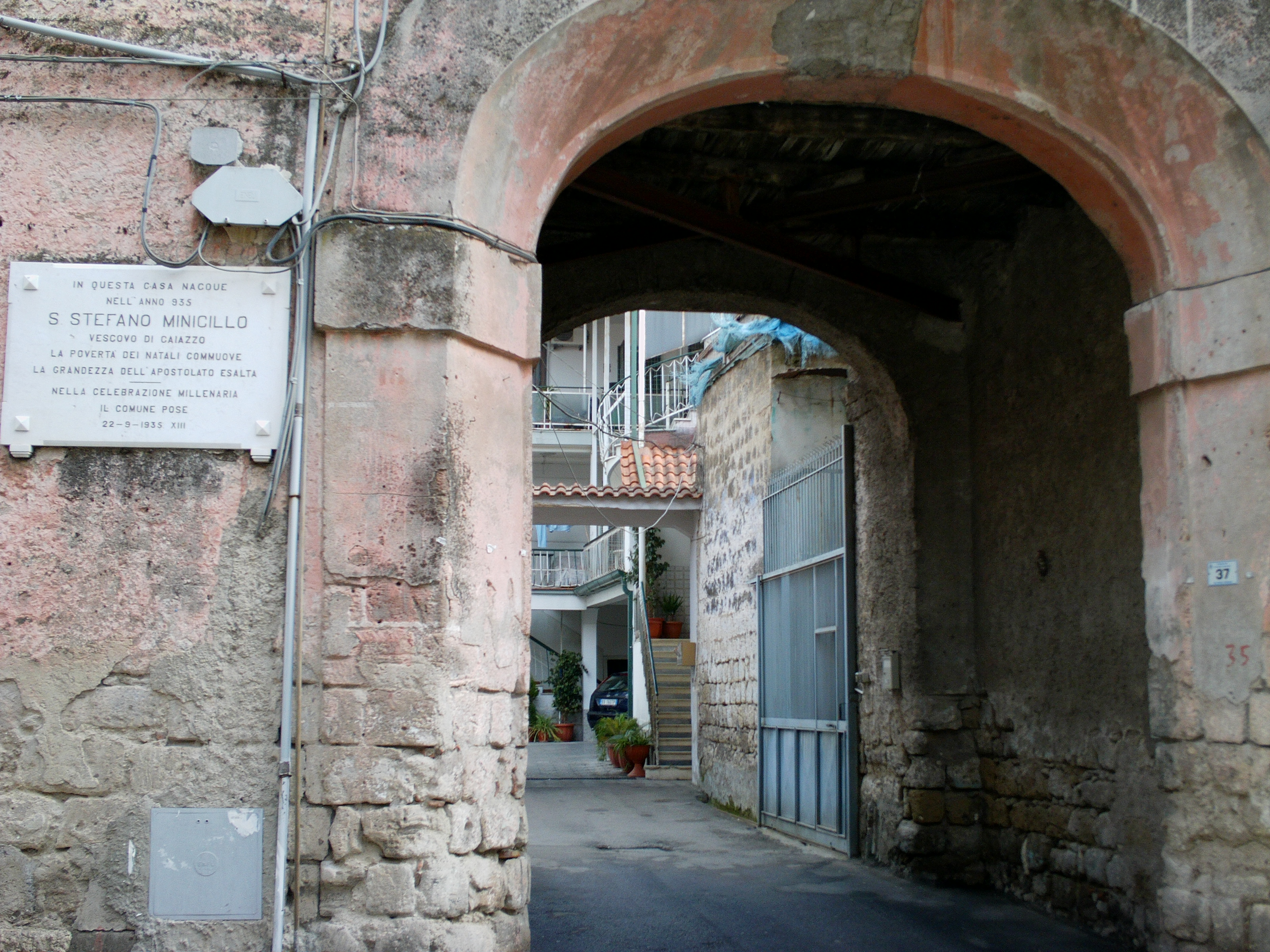 Casa natia di Santo Stefano Minicillo, con annessa lapide commemorativa, a Macerata Campania.